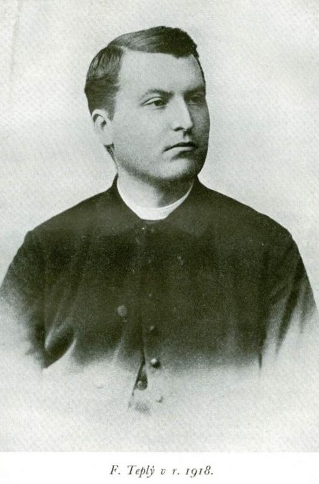 František Teplý (1867 - 1945), Český římskokatolický kněz a archivář.